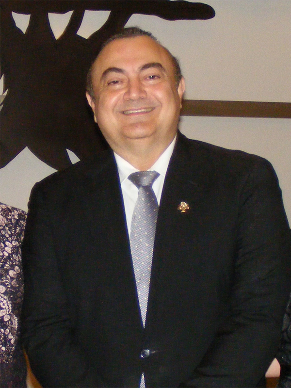 Roberto Abraham Mafud en el Club Libanés de Mérida.